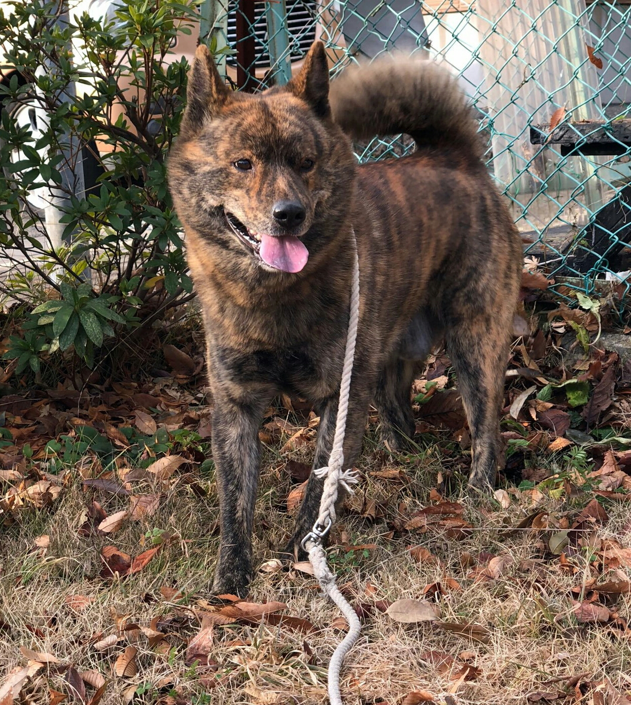 甲斐犬の正面